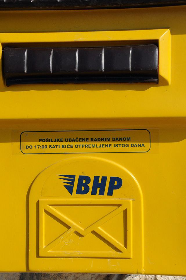 BHP: JP BH Pošta (Bosnia & Herzegovina post service)